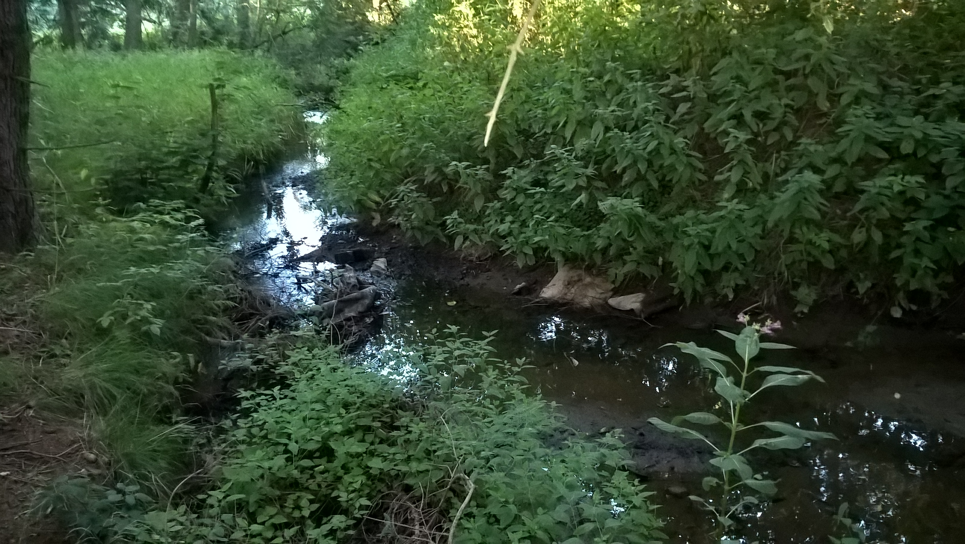 Ředkovský potok nad Babicemi, pod rybníkem Ředkovec